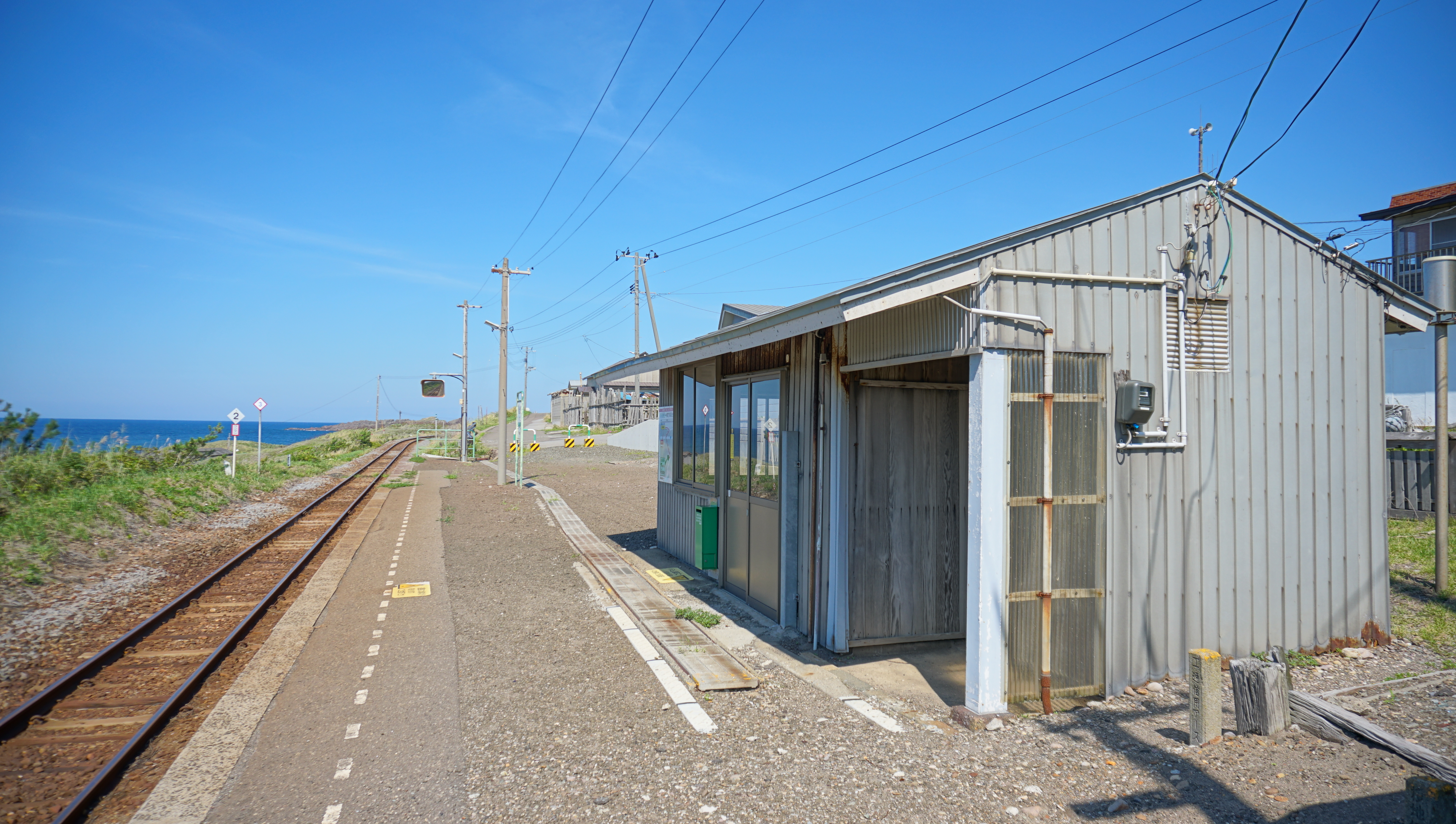 五能線 風合瀬駅（青森県西津軽郡深浦町）